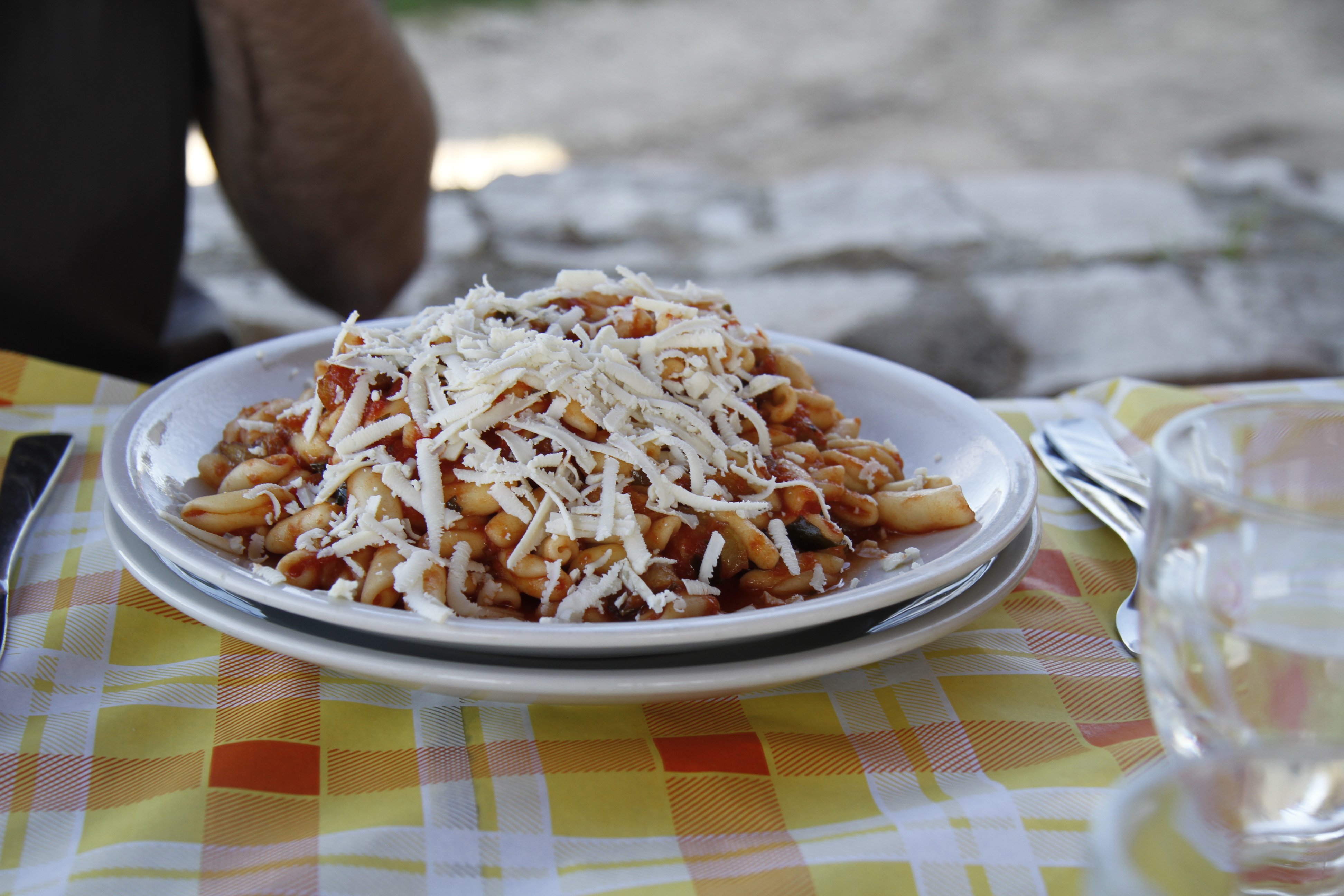 Noto, Cavatelli pomodoro ricotta salata